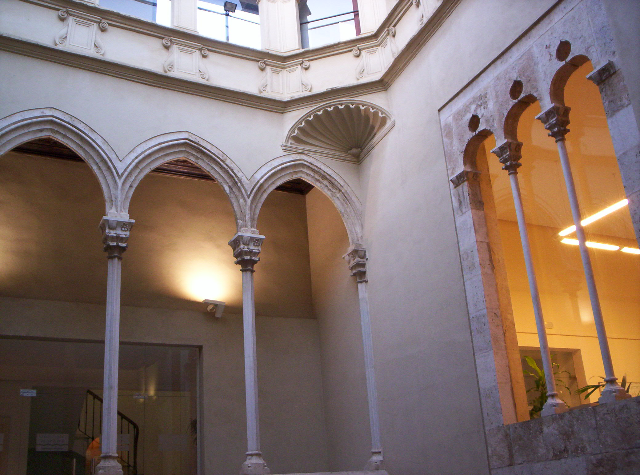 Galeria i finestra gòtics que donen al pati del Palau dels Scala, València.